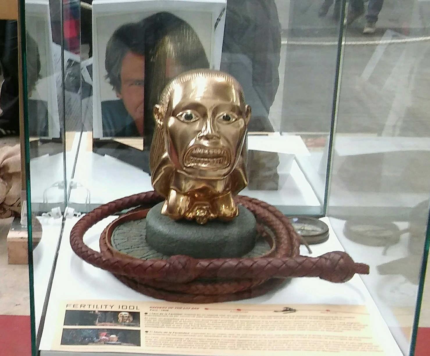 Ídolo Hobito de Indiana Jones en el Salón del cine Barcelona 2016